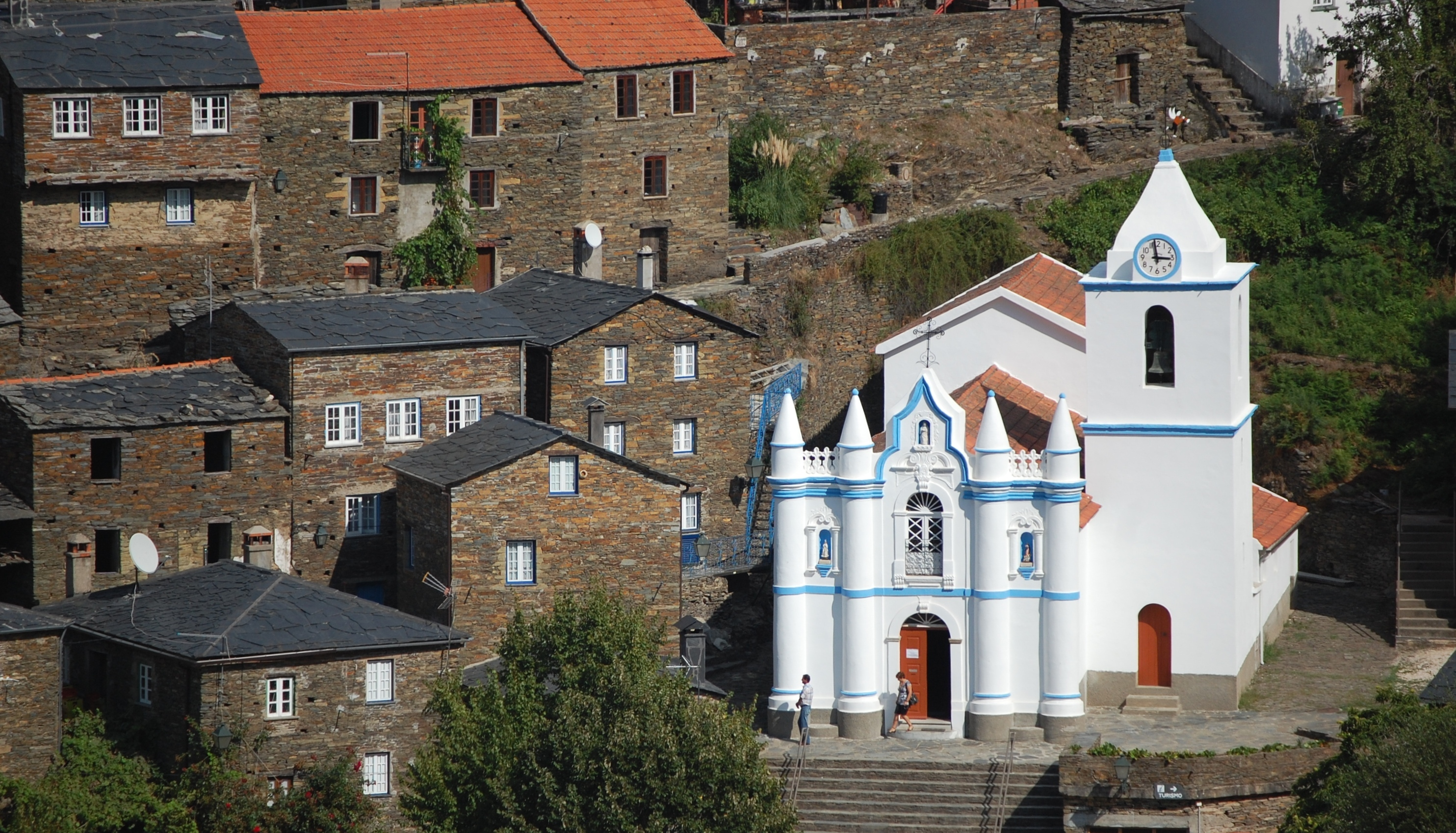 Portugal - Piodao